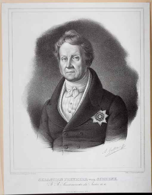 Der bayerische Jurist, Politiker und Minister Sebastian von Schrenck (1774-1848)